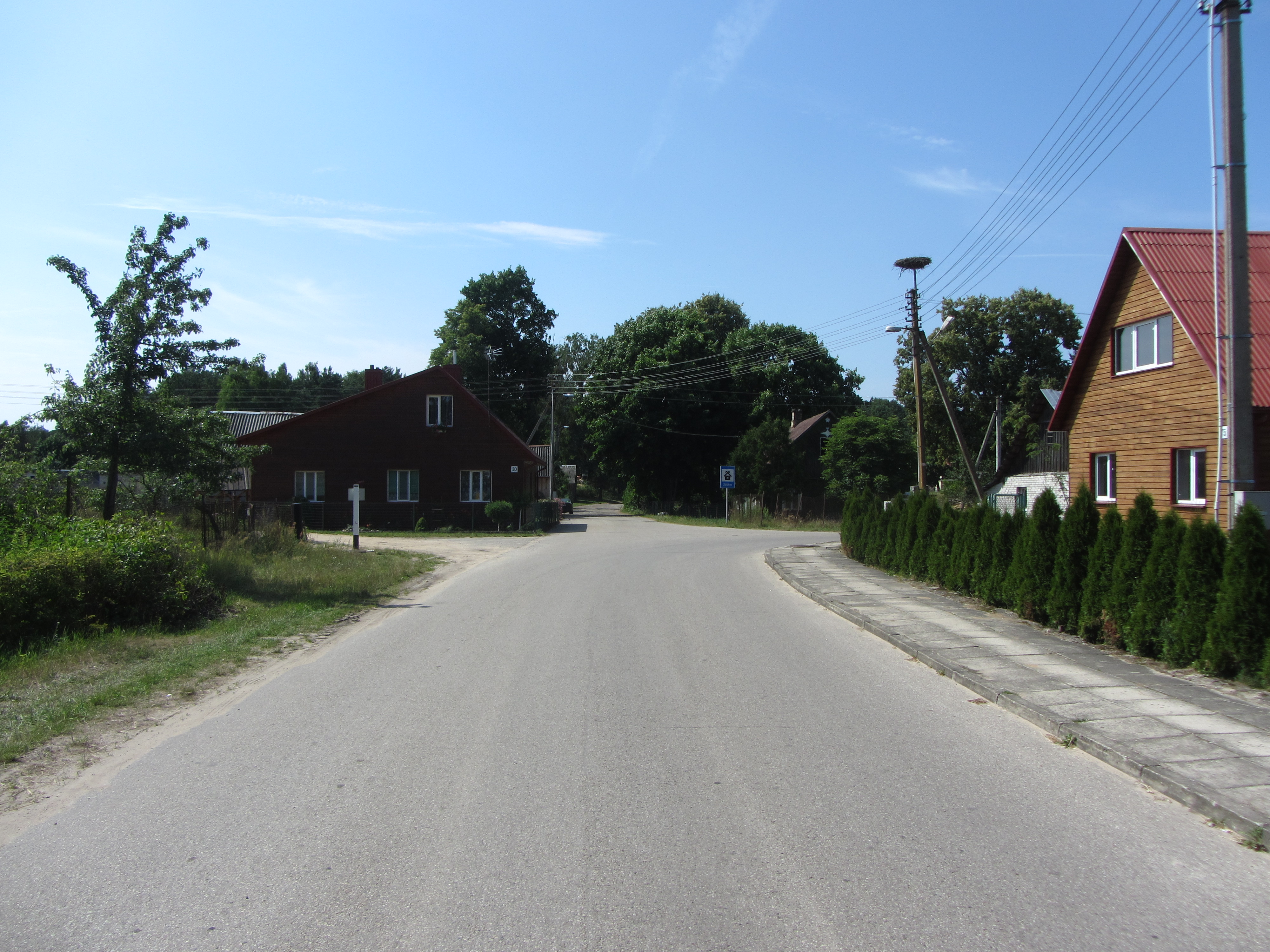 Švendubrė 66444, Lithuania